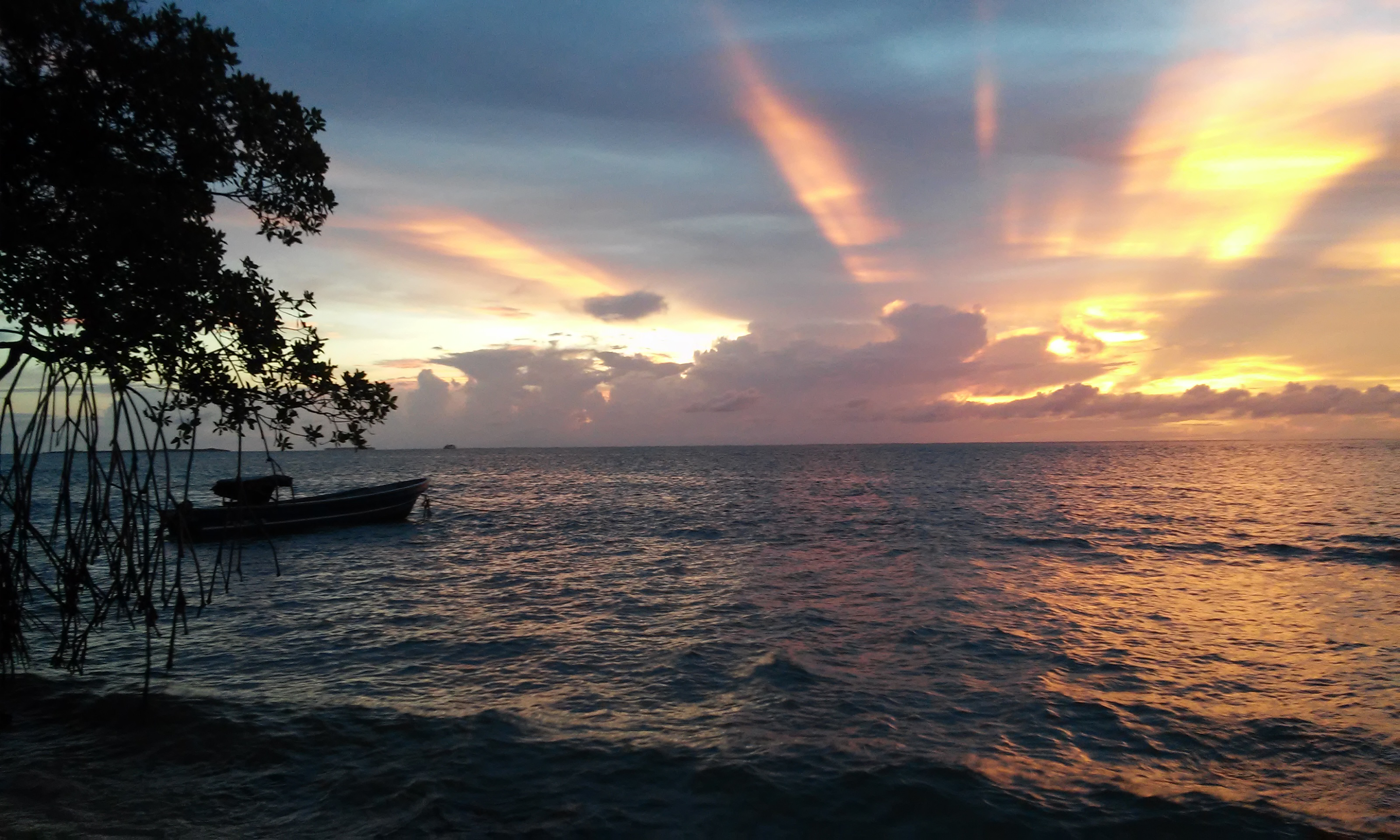 Atardecer desde la perspectiva de los Callo Miskitos en el Mar Caribe nicaragüense.